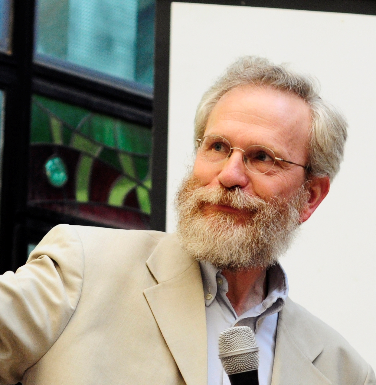 אבינועם רוזנק ראש החוג למחשבת ישראל שבאוניברסיטה העברית בירושלים ועמית מחקר במכון ון ליר בירושלים.